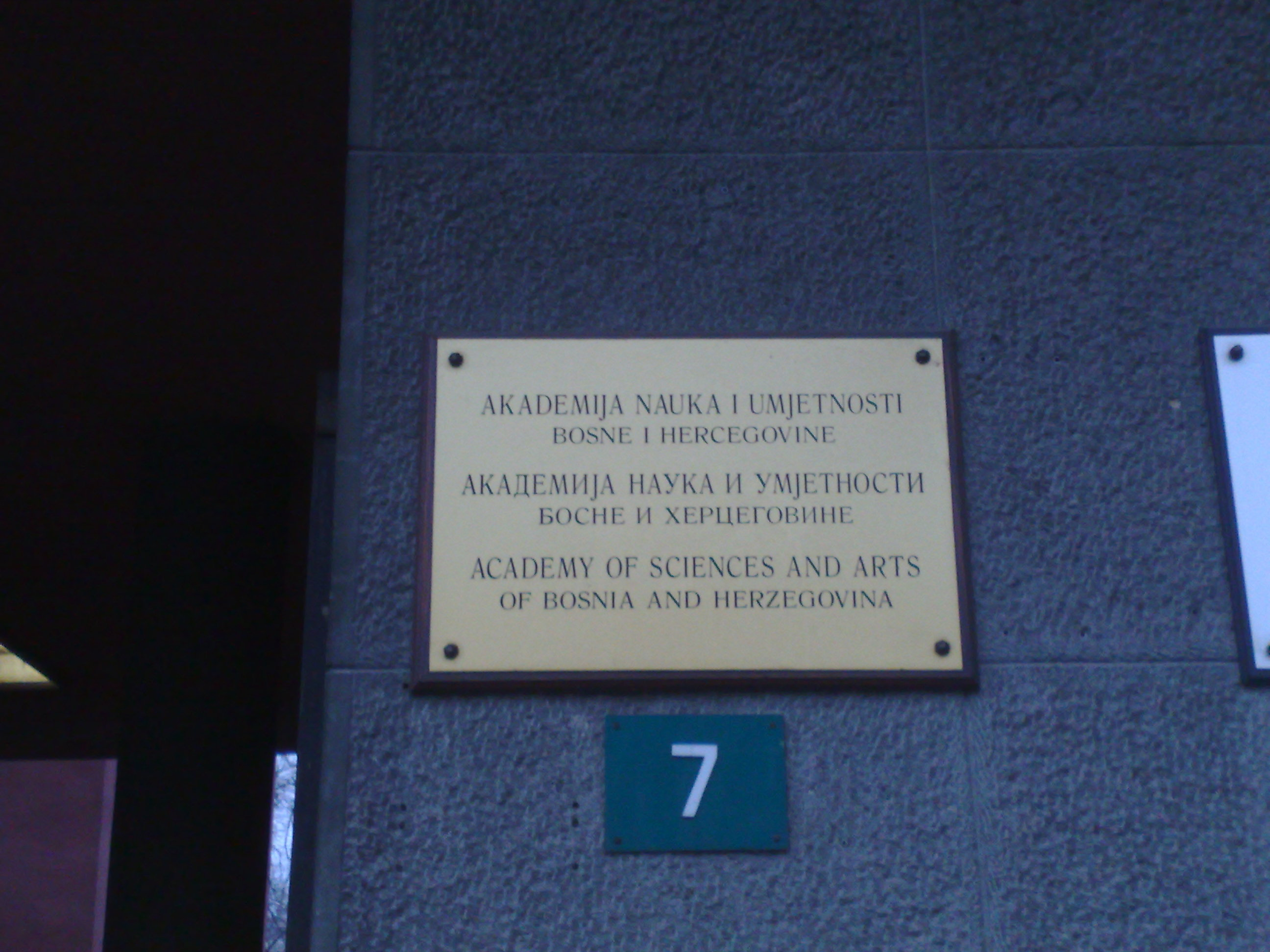 Ploča sa natpisom: Akademija nauka i umjetnosti Bosne i Hercegovine